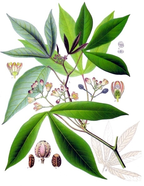 Maniok. A Blühender Zweig natürlicher Grösse. B fünfteiliges Blatt, verkleinert. 1 männliche Blüte im Längsschnitt 2/1; 2 weibliche Blüte im Längsschnitt 2/1; 3 Frucht natürlicher Grösse; 4 Same von innen; 5 Same von der Seite gesehen; Stärkekörner.